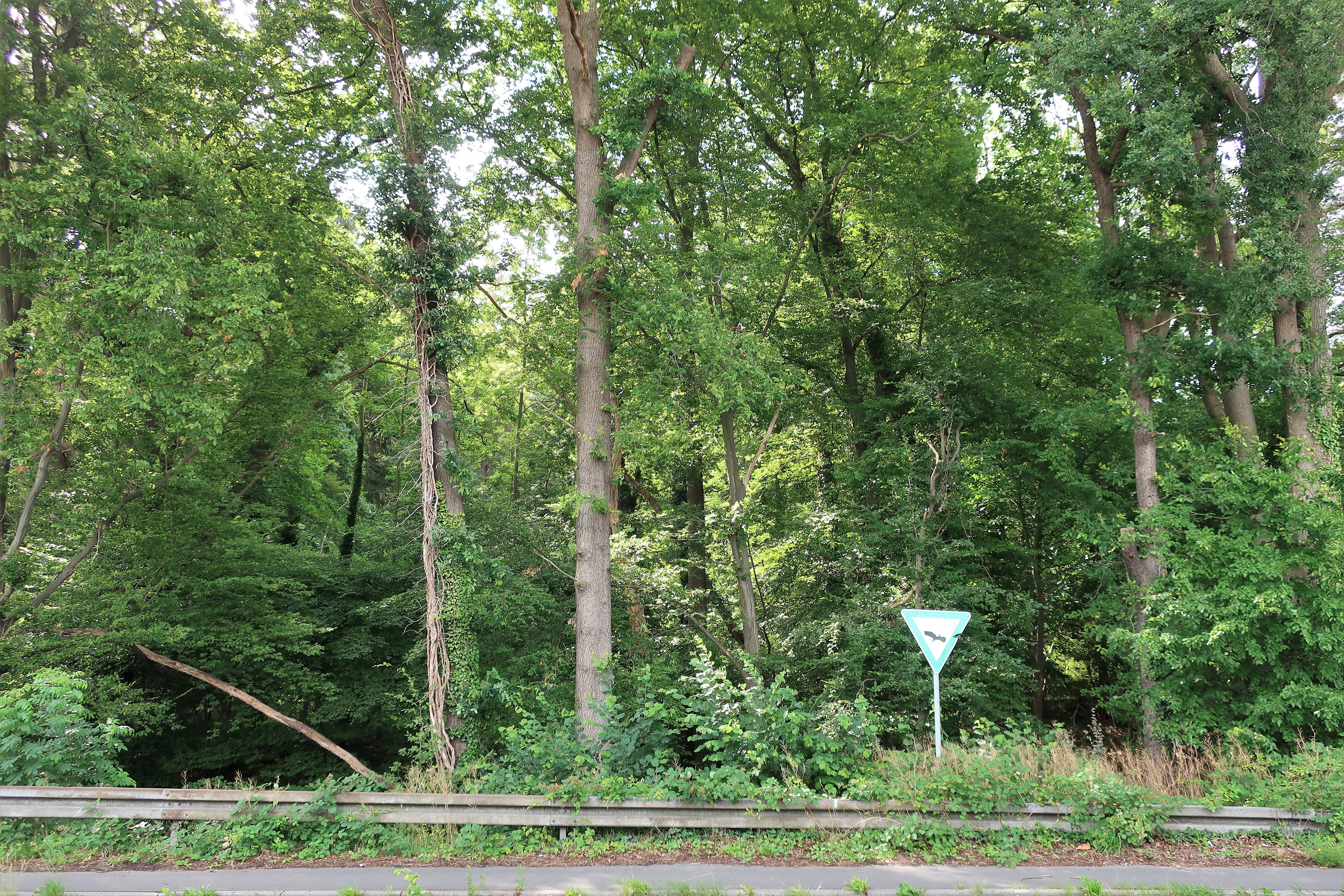 Geschützter Landschaftsbestandteil 1.4.2.19 „Wald und Teiche Gut Schönfeld“ in Hagen-Vorhalle, östlich von Gut Schönfeld. Es handelt sich um einen Laubwald mit einigen Kiefern, in dem 5 Teiche künstlich durch Bachaufstauungen angelegt wurden, sowie um eine Wiesenbrache.